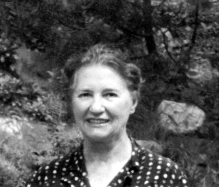 Marie Úlehlová Tilschová